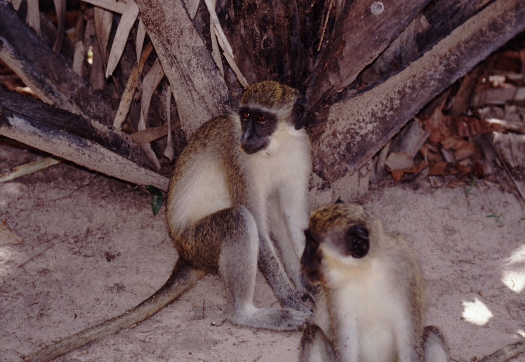 Grüne Meerkatzen (Chlorocebus sabaeus) im Bijilo Park